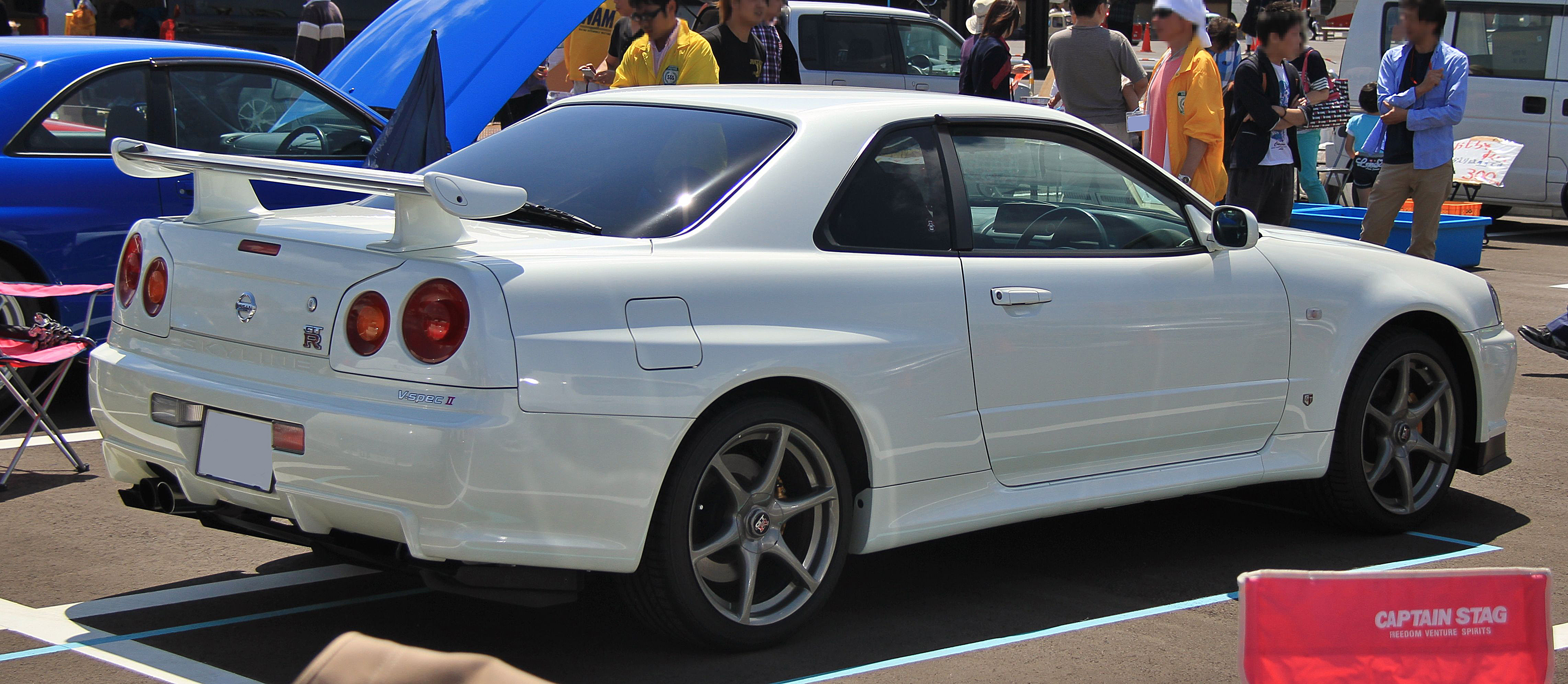 Nissan Skyline GT-R R34 V Spec II